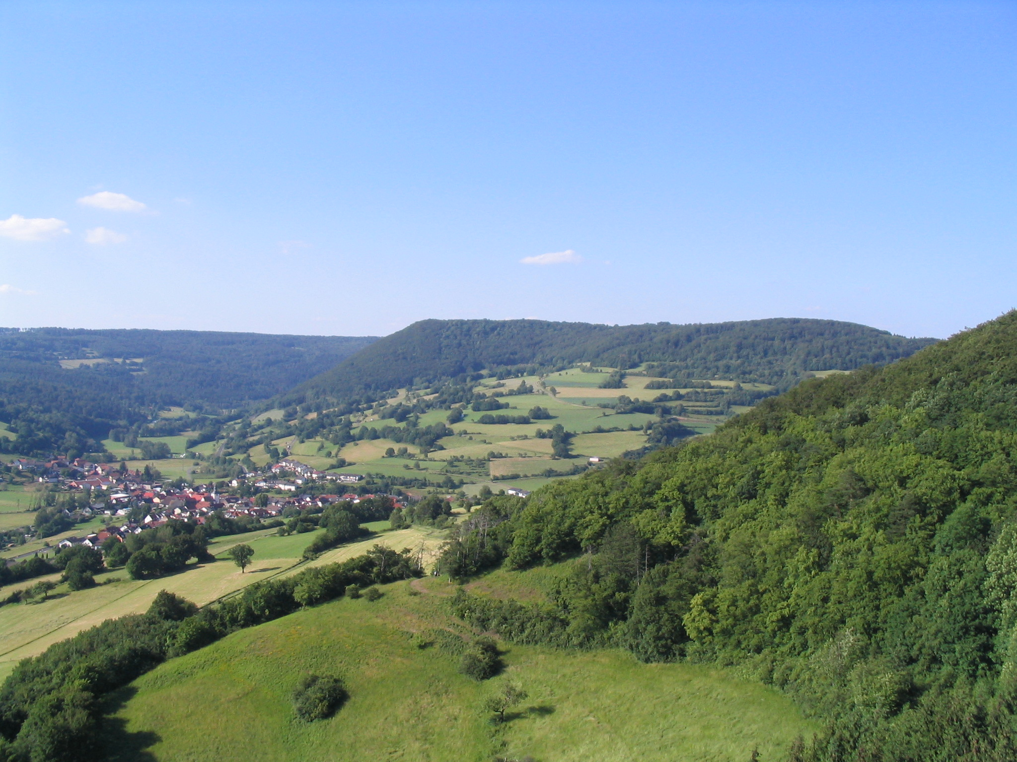 Der Stoppelsberg (571 m) über dem Sinntal, aufgenommen von Burg Schwarzenfels mit Blick nach Norden